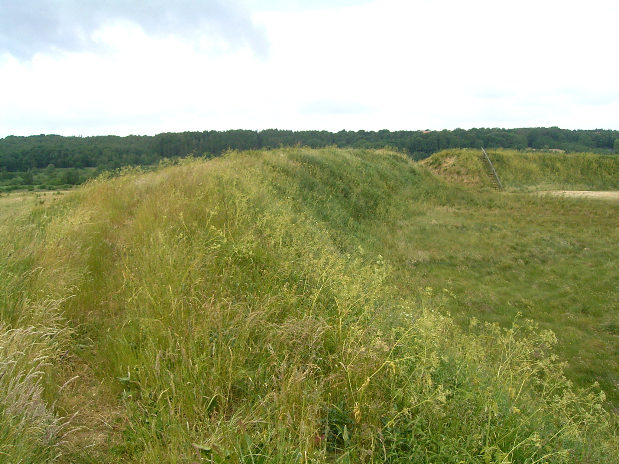 Vikingeborgen Fyrkat in Hobro